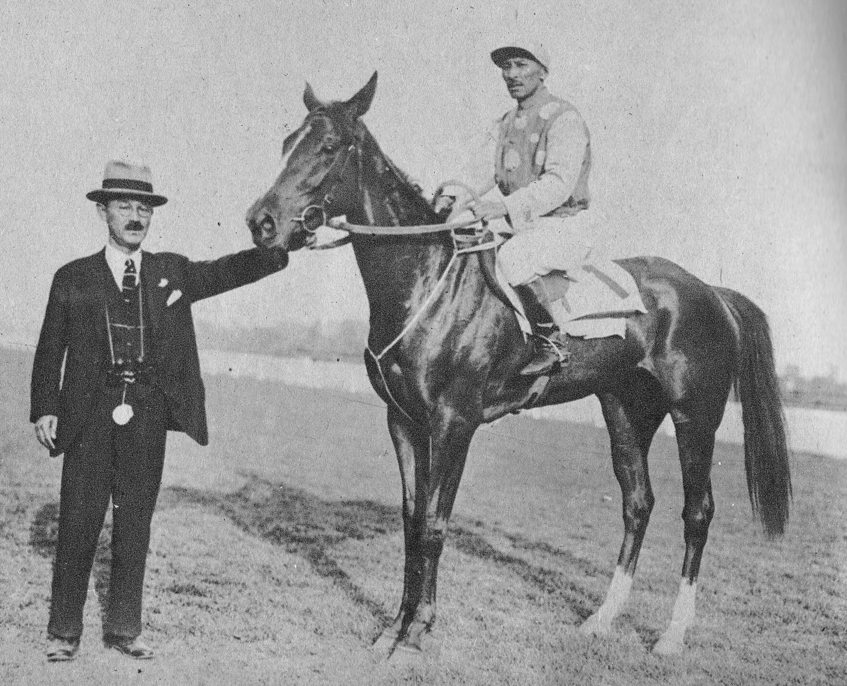 クレオパトラトマス